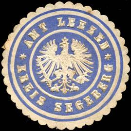 Sealing stamp Title: Amt Leezen - Kreis Segeberg Description: blau, weiß, geprägt Place: Leezen size: 4 cm